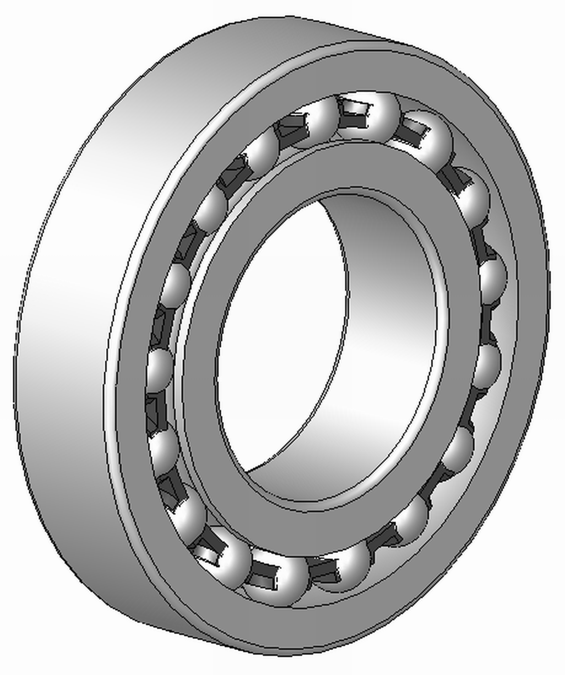 Pendelkugellager, Massivkäfig aus Kunststoff, Hinweis: Innenaufbau des Lagers (insbesondere des Kaefigs) variiert je nach Hersteller und Baugroesse rolling contact bearings